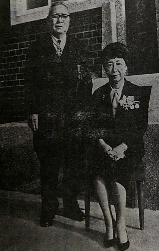 建築家・実業家の杉野繁一（左）、ファッションデザイナー・学校経営者の杉野芳子（右）。両氏の寄付によって建設された佐屋町立杉野図書館の開館時に発行された『広報佐屋町だより』特集号にて。